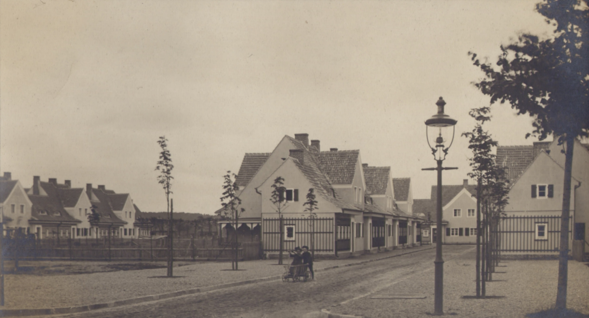 Das Bild zeigt den Eingang in die Kleinhaussiedlung am Steinberg von der heutigen Straße An der Heide aus.